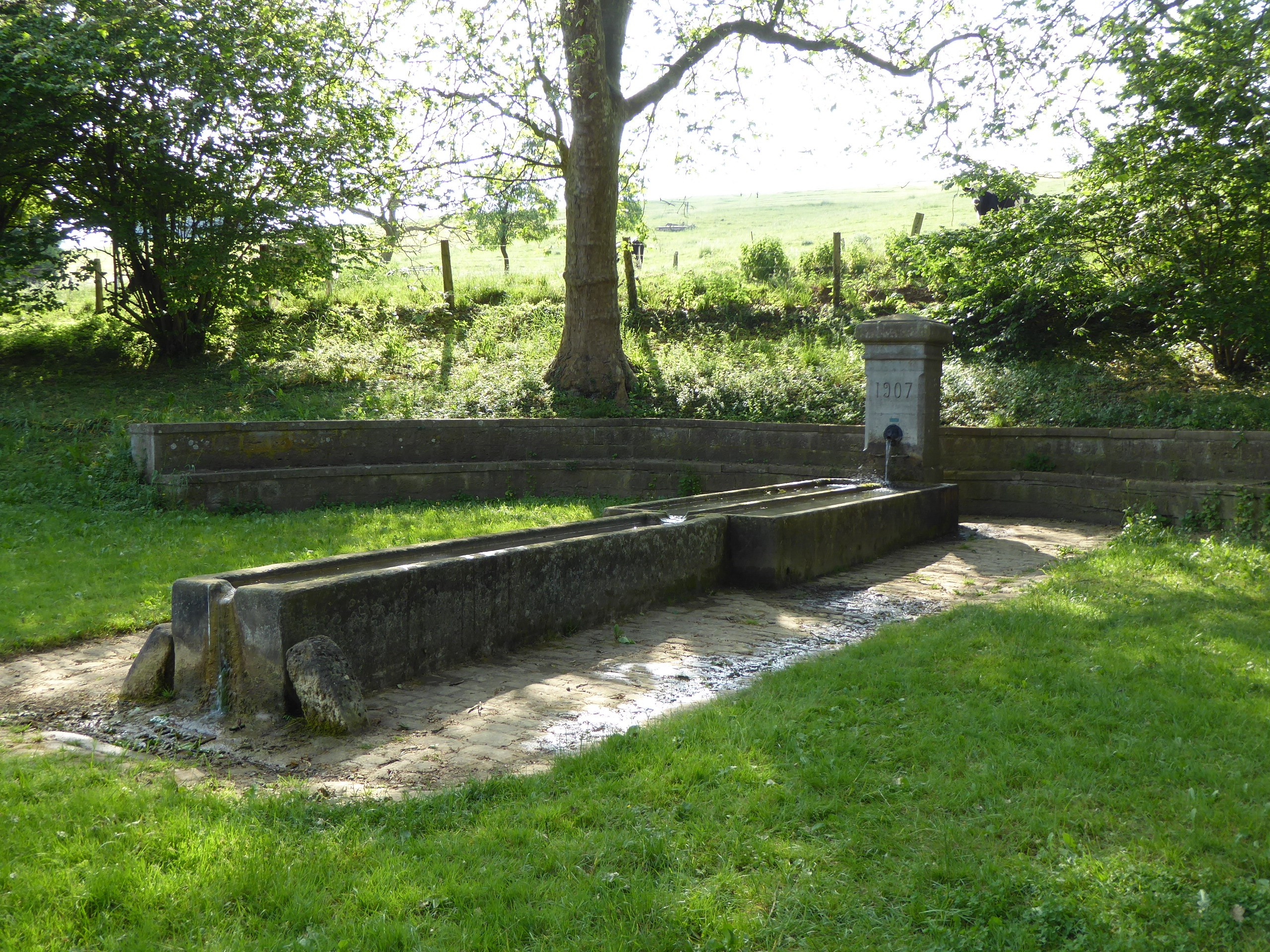 Fontaine à une entrée de la commune d'Agincourt près de Nancy en Lorraine.